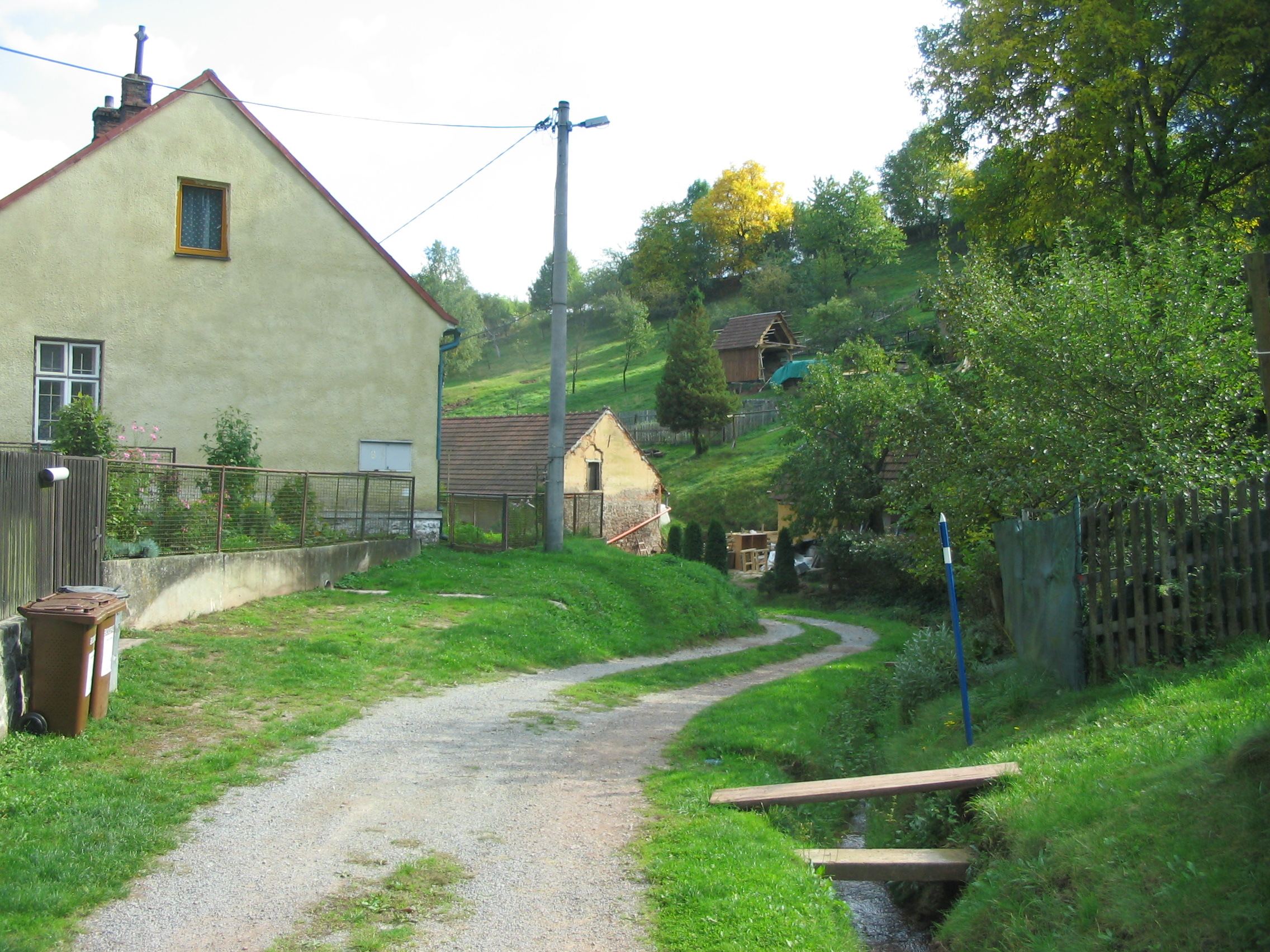 Klevetov, část Letovic.